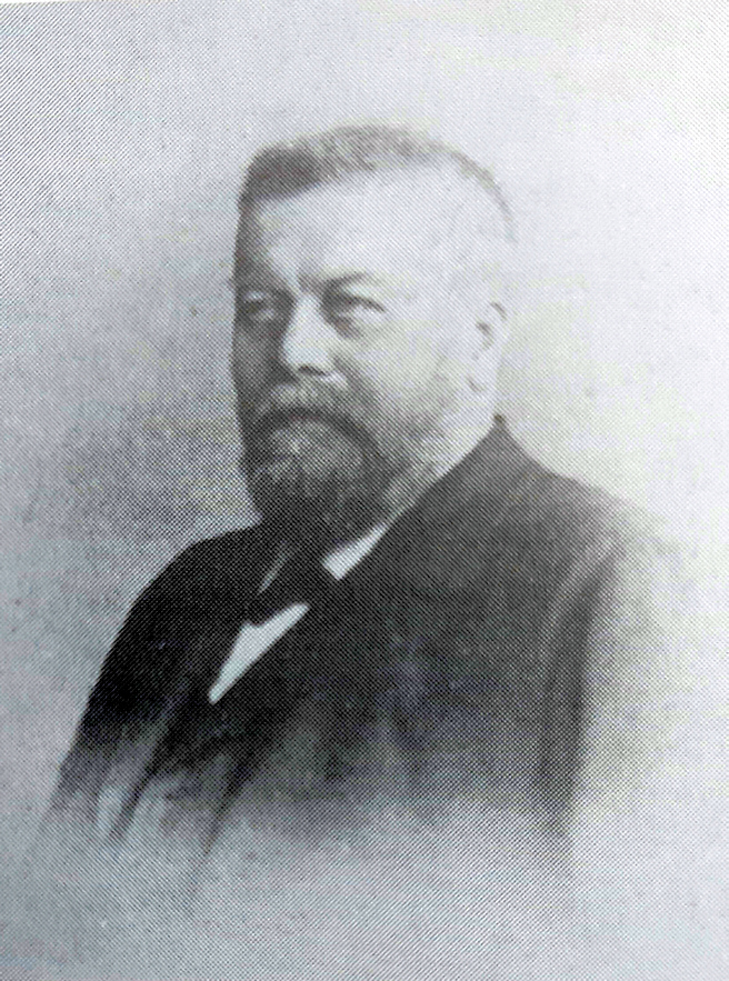 Hermann Elting (1838-1898), Bauunternehmer, Holzhändler, Stadtrat der Stadt Essen